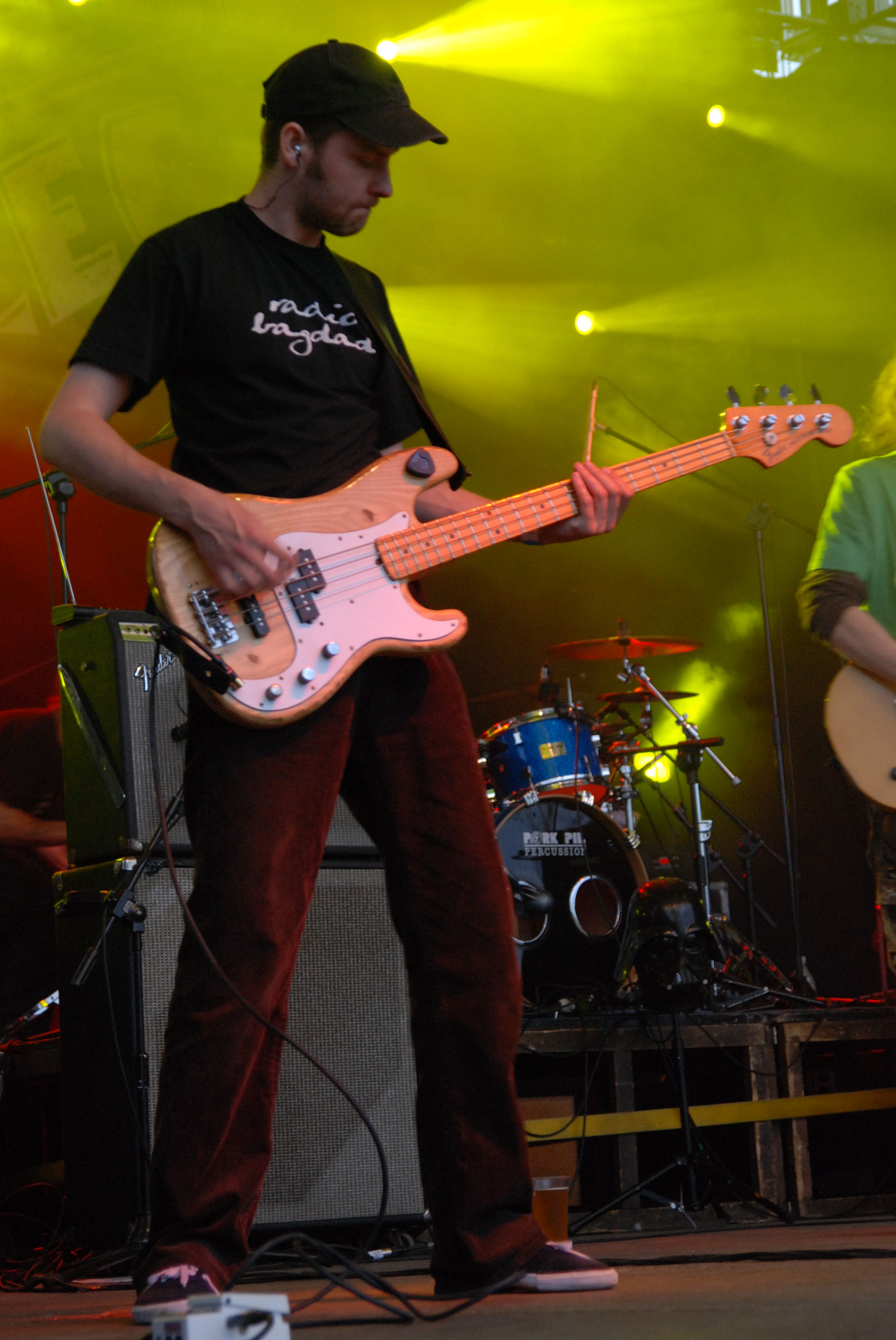 Ireneusz Wojna podczas koncertu plenerowego na Lotnisku Muchowiec w Katowicach. Juwenalia Śląskie 17.05.2008r .